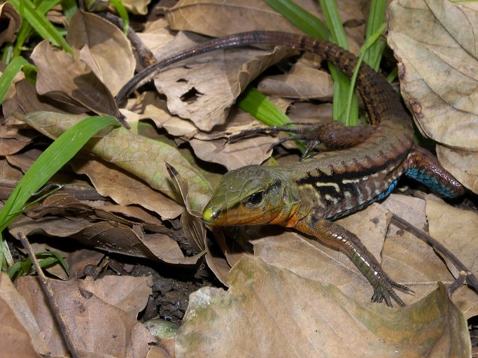 Ameiva festiva